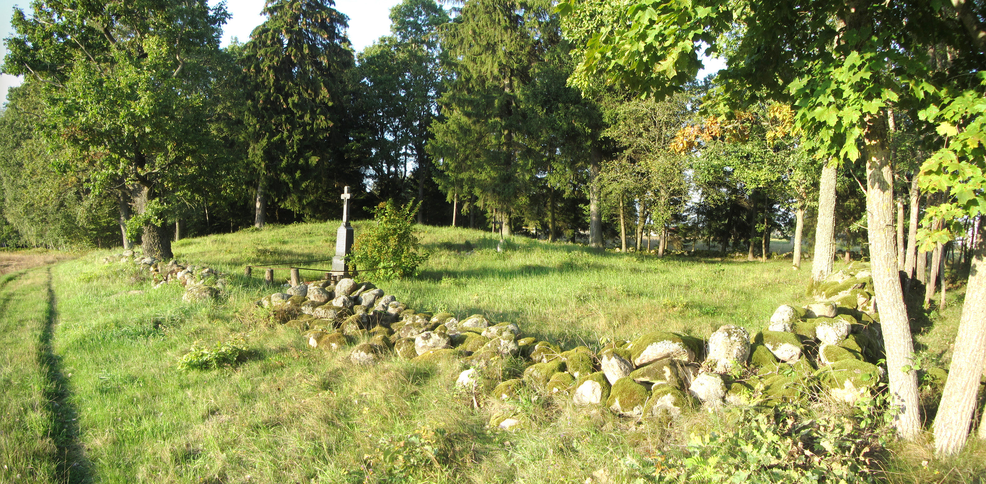 Serbentai 17204, Lithuania